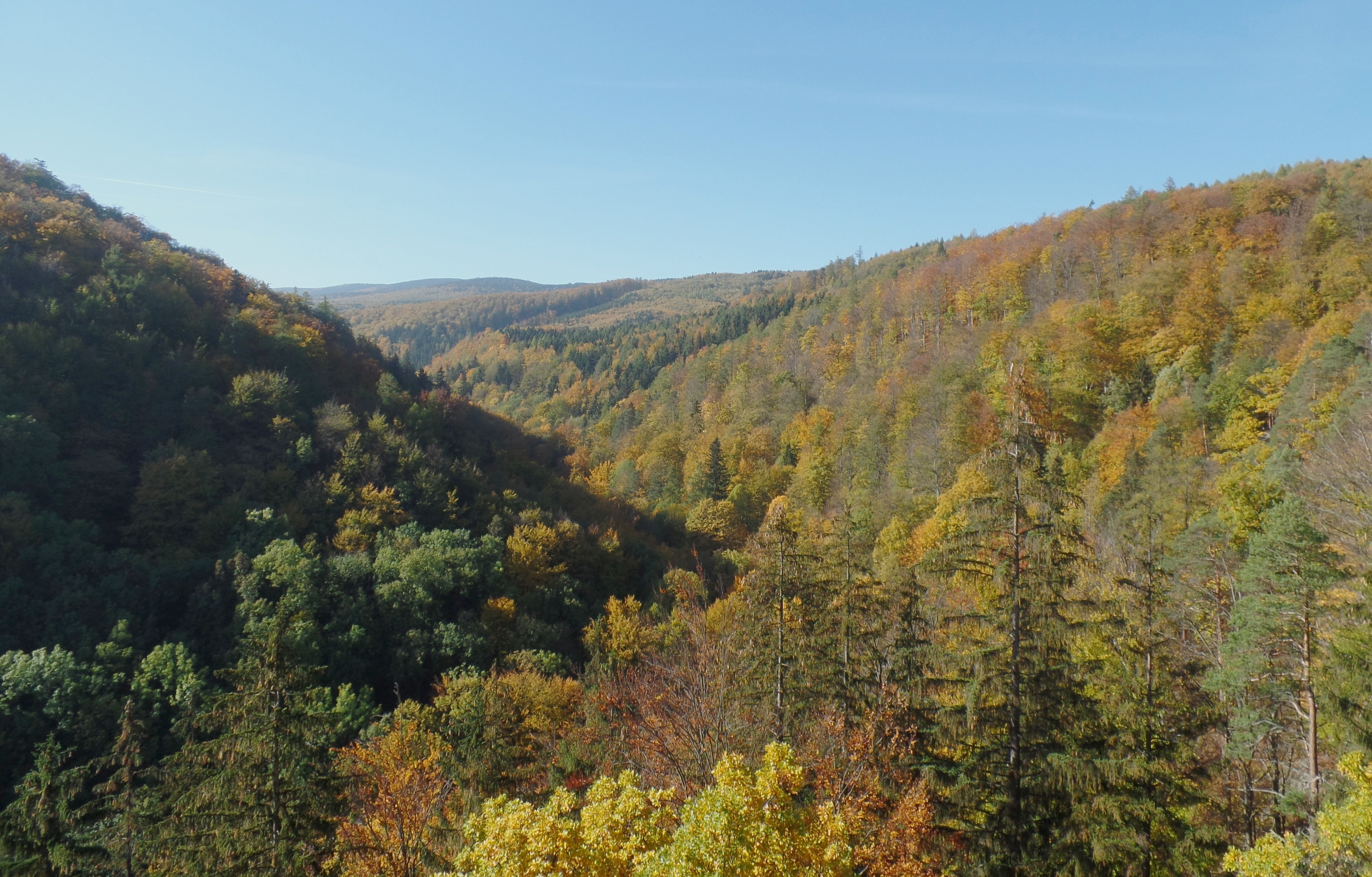 Widok z Čertovy kazatelny w Račí údolí Widok z skały Diabelska ambona